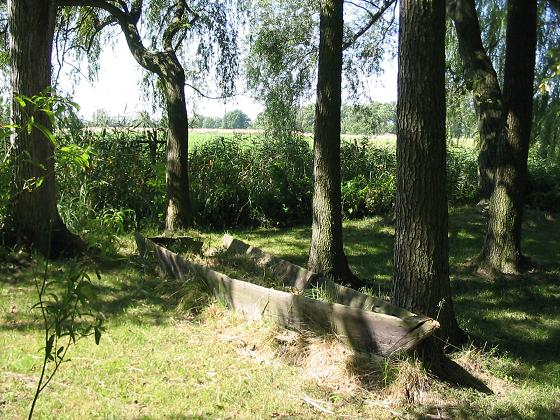 Gröbener Kietz, Brandenburg. Verfallenes Boot an der alten Nuthe